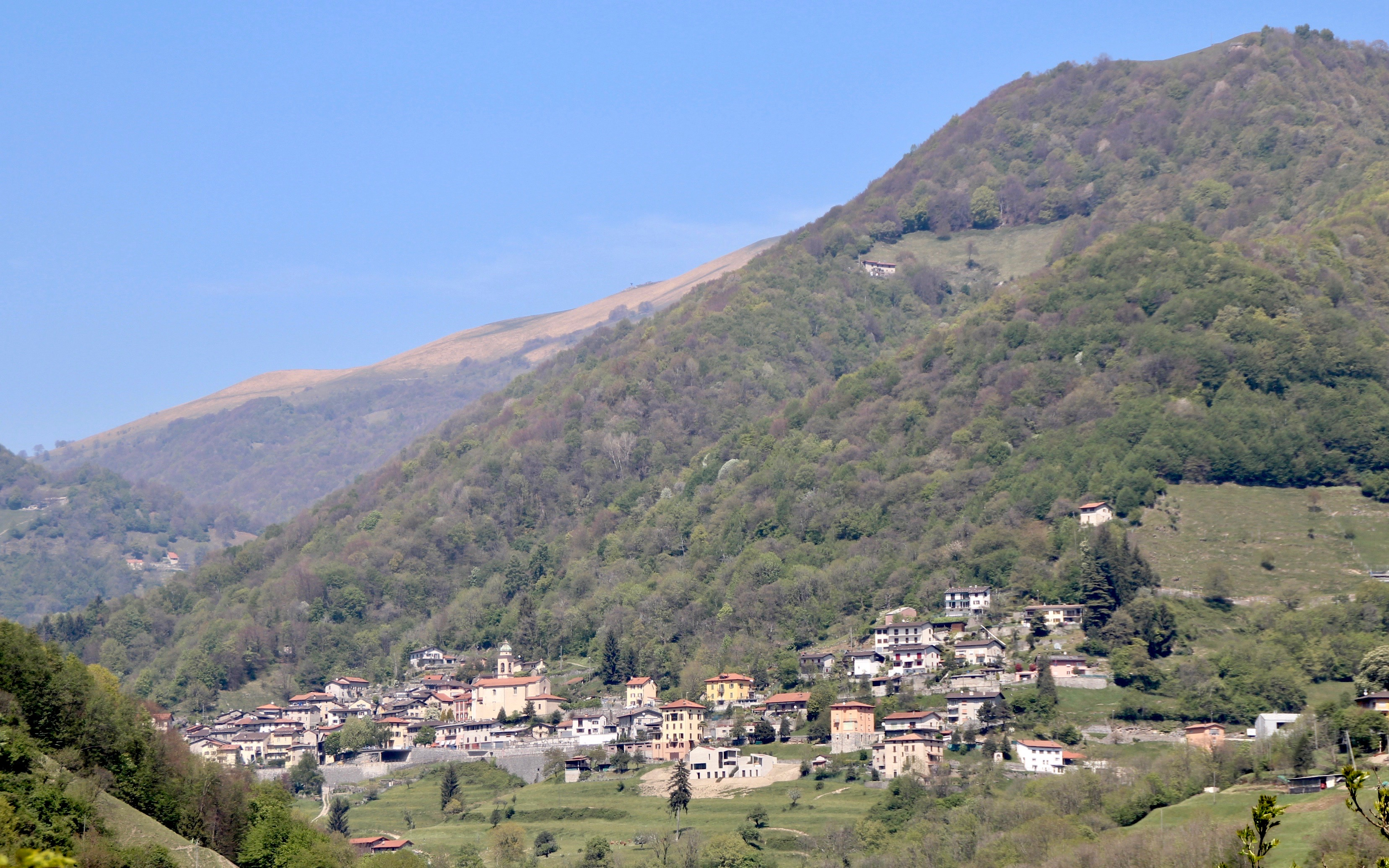 de: Muggio